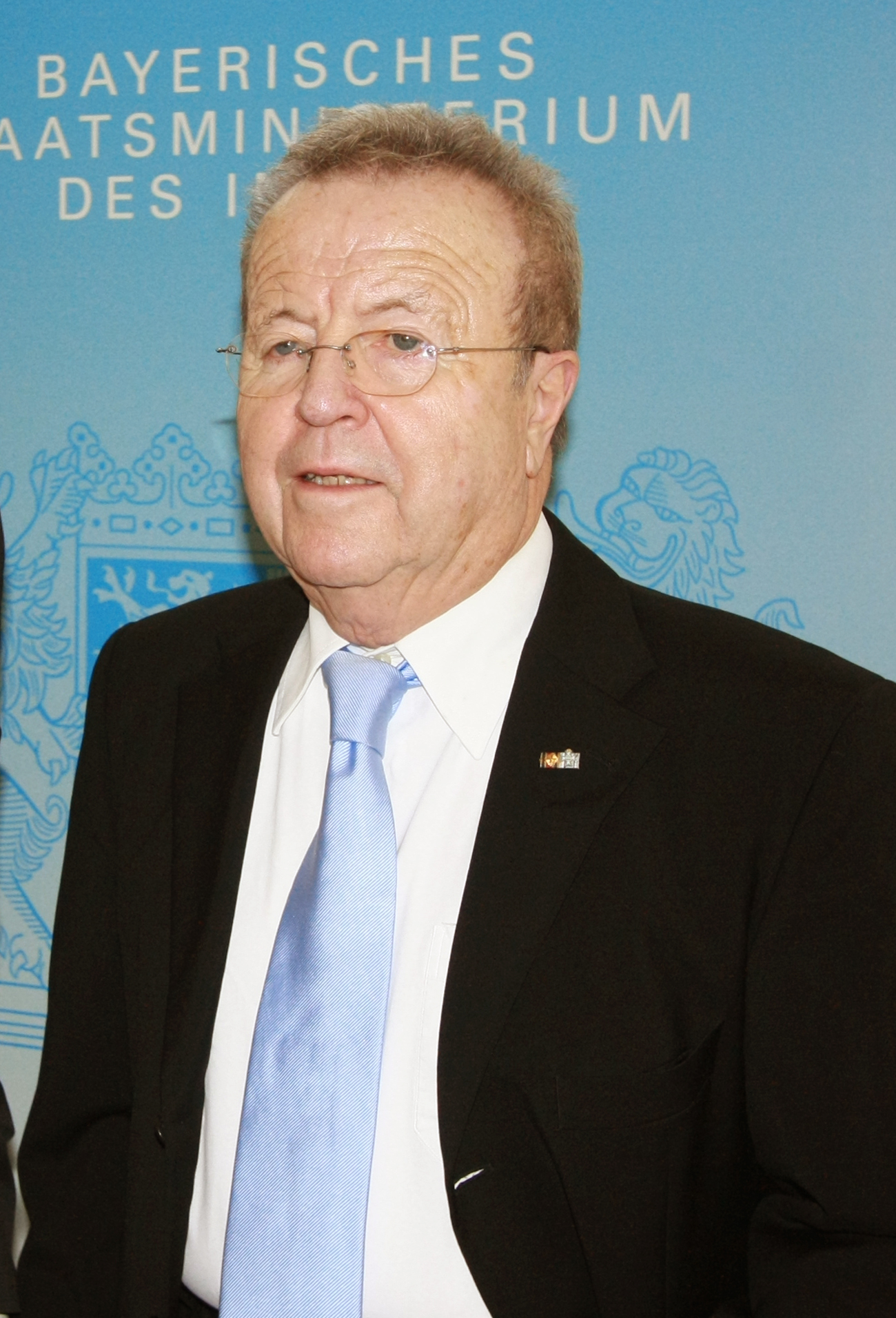 Gerold Tandler, ehemaliger deutscher CSU-Politiker. Hier am 17.04.2012 im Bayerischen Innenministerium.